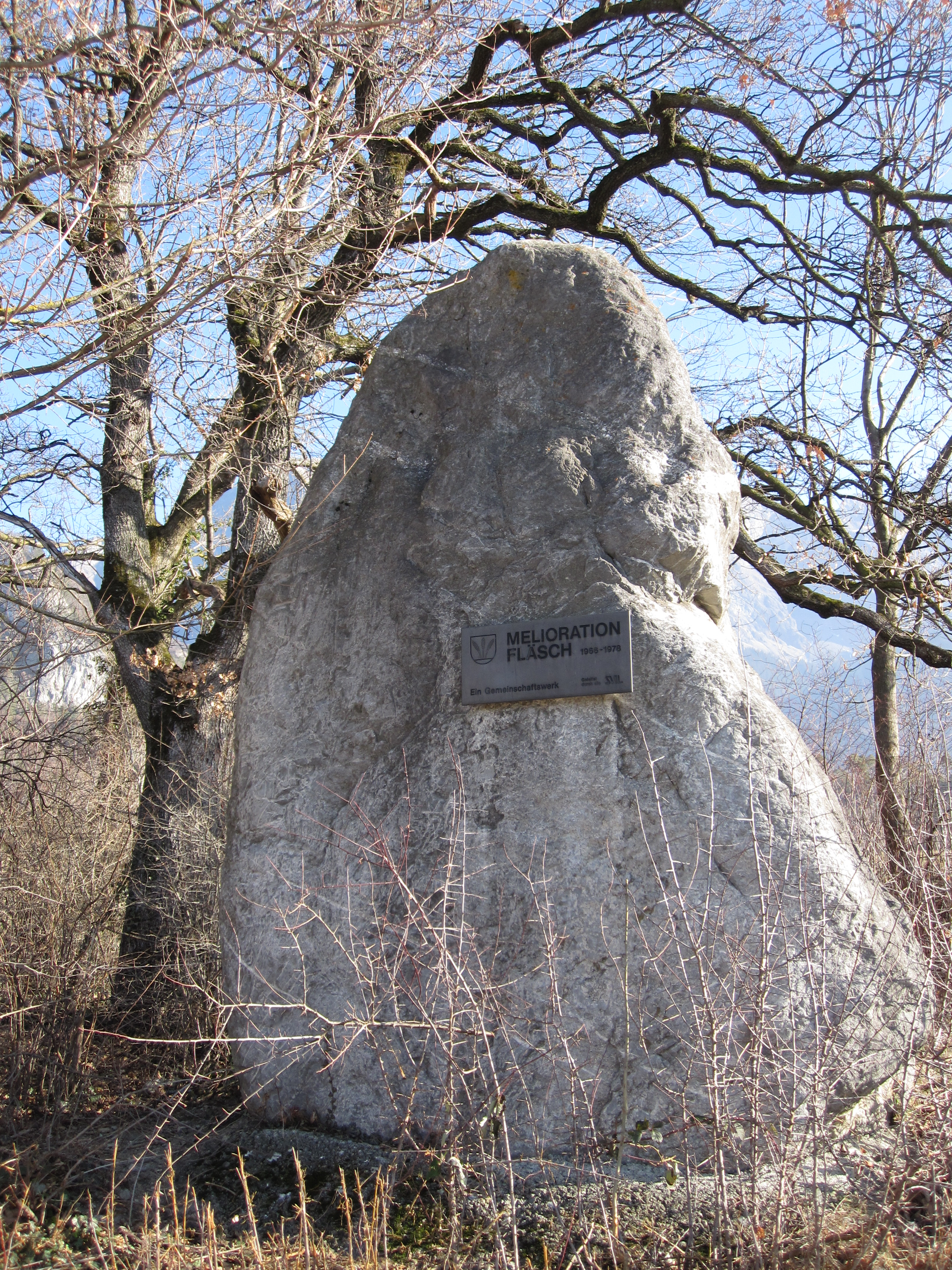 Gedenkstein zur Erinnerung an die Melioration der Gemeinde Fläsch (Kanton Graubünden)